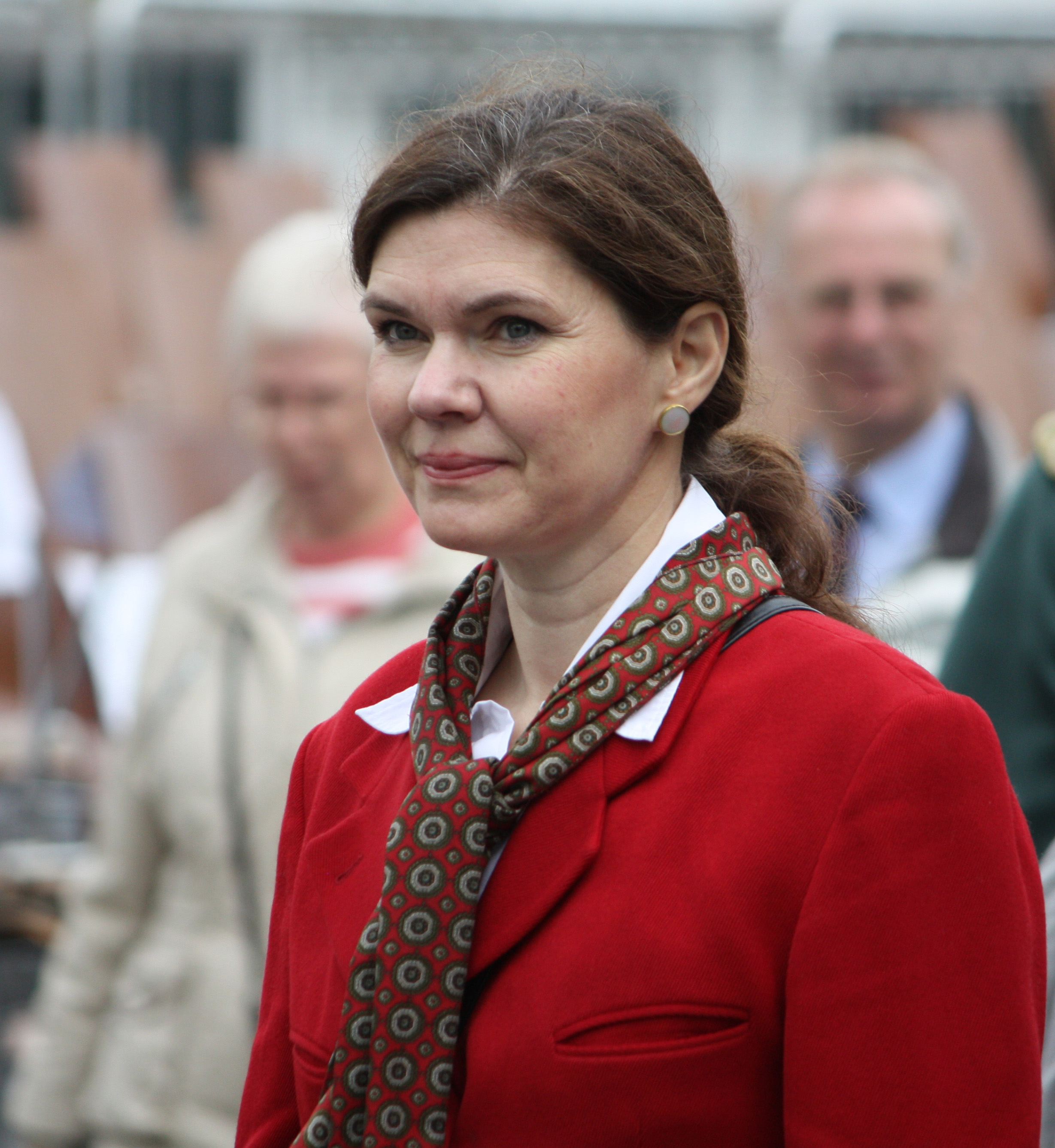 Sabine Amsbeck-Dopheide, Bürgermeisterin von Harsewinkel, Nordrhein-Westfalen aufgenommen beim Bundesschützenfest 2011 in Harsewinkel